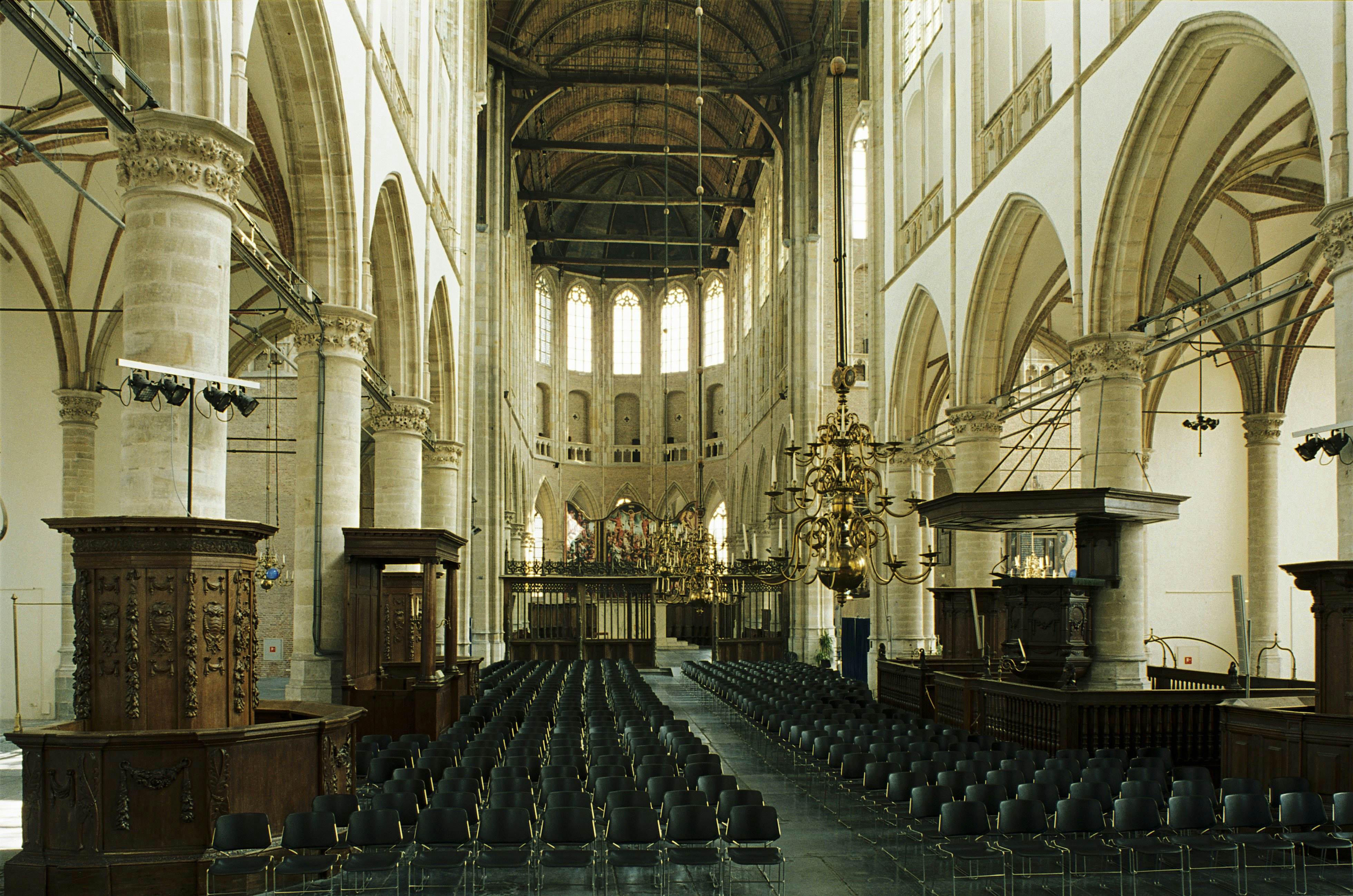 Grote Sint Laurenskerk: Interieur, overzicht van het schip (opmerking: Gefotografeerd voor Kanjers eerste ronde)